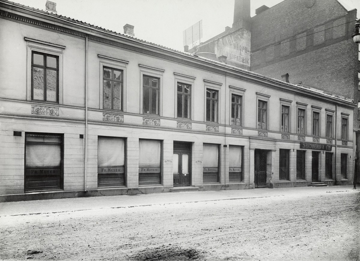 Kongens gate nr. 8 og 6 i Kristiania, ca. 1900